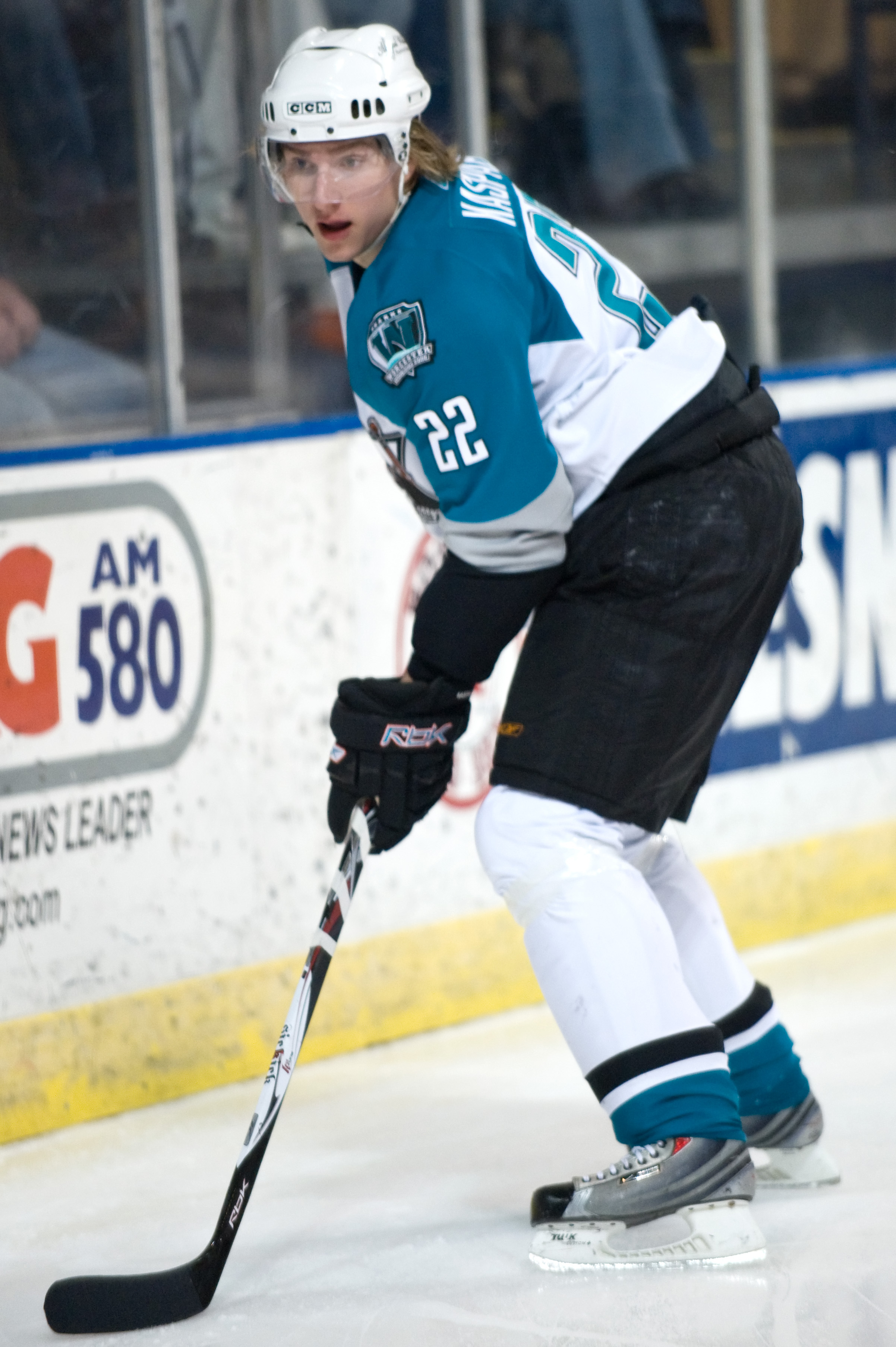 Lukas Kaspar